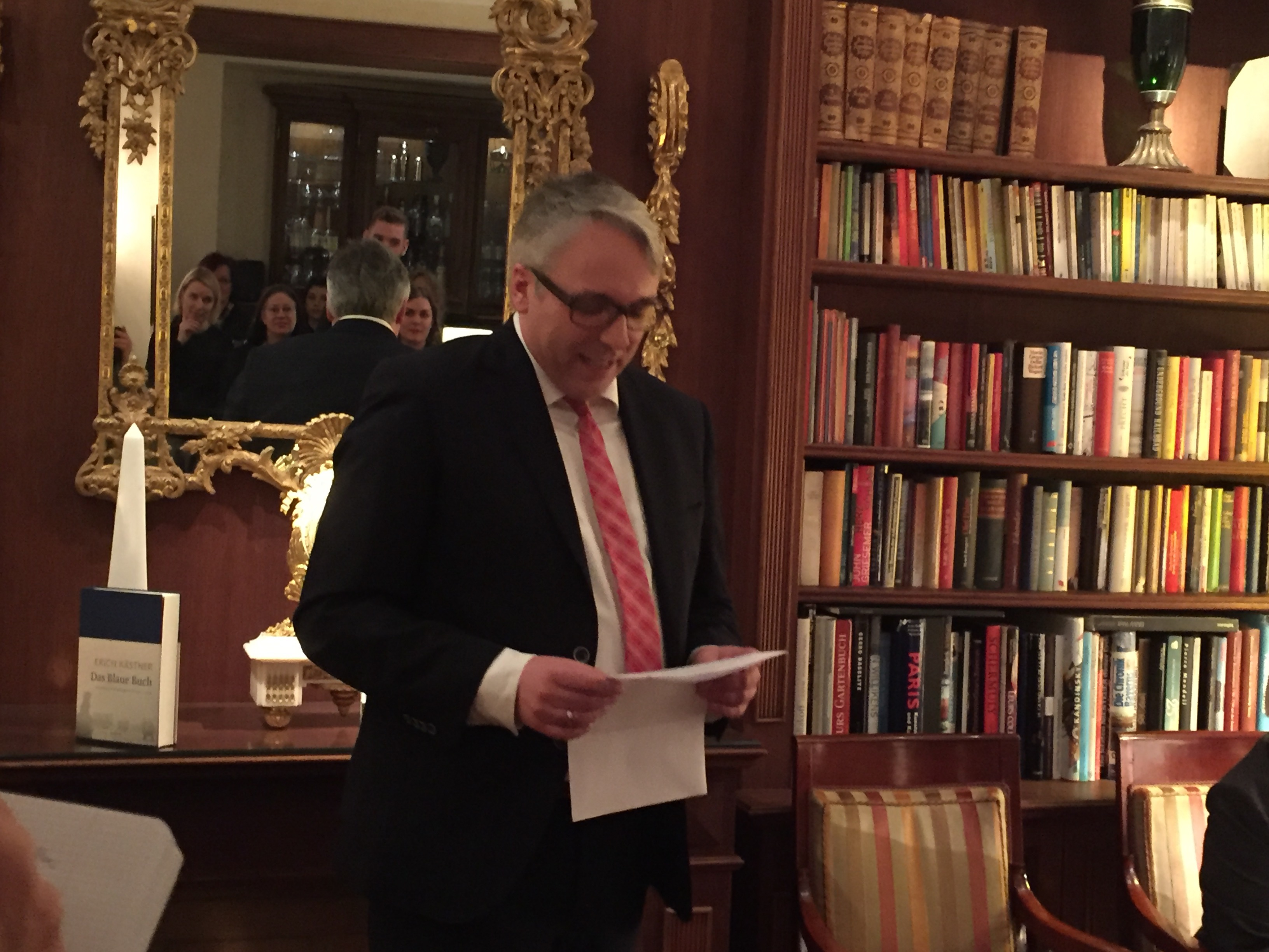 Tim Jung, Verlagsleiter des Atrium Verlags, stellt Erich Kästners geheimes Kriegstagebuch "Das Blaue Buch" im Hotel Dollmann in München, wo Erich Kästner 1945 wohnte, der Presse vor.